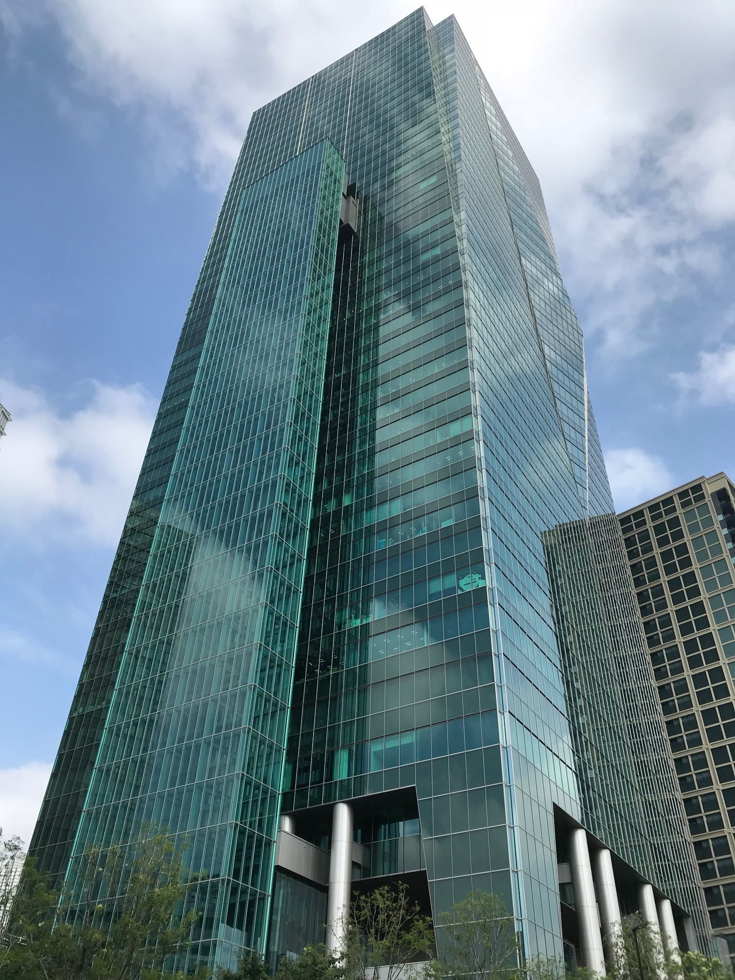 六本木グランドタワー（なだれ坂から）